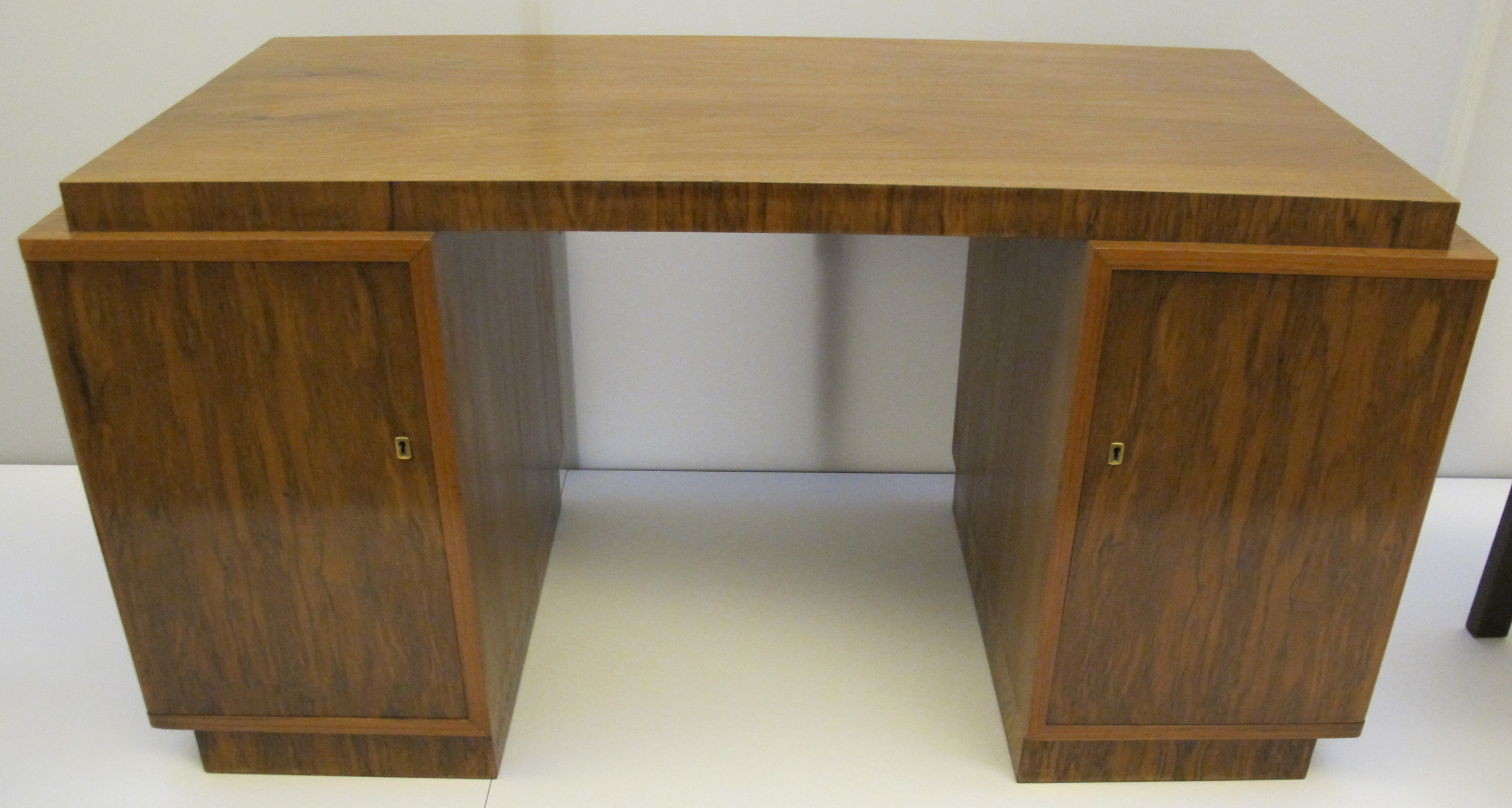 Erich dieckmann, scrivania, 1924 ca